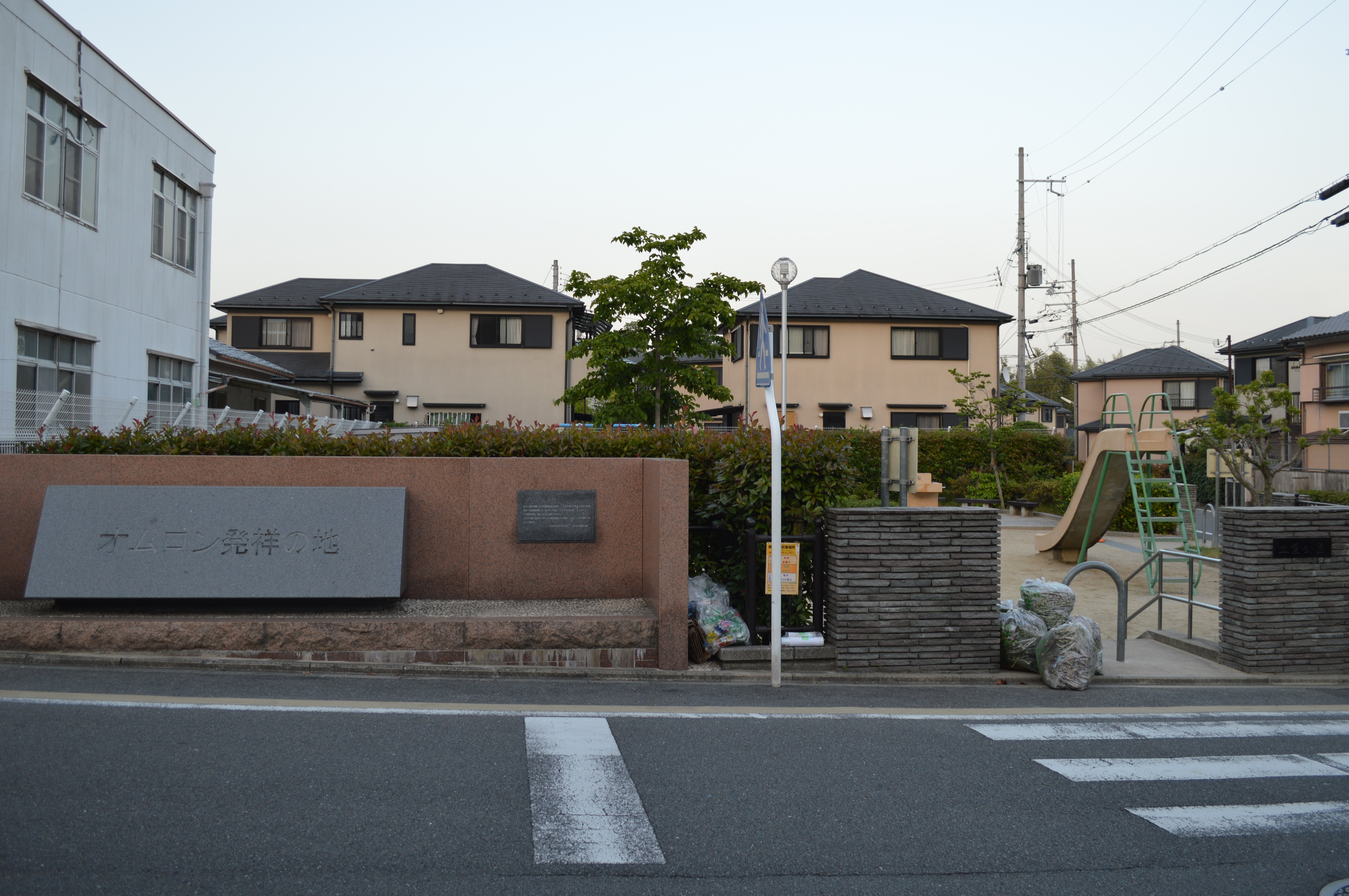 京都市右京区花園 土堂公園と「オムロン発祥の地」の石碑 2005年5月10日建立（石碑の場所は右京区御室ではなく右京区花園）